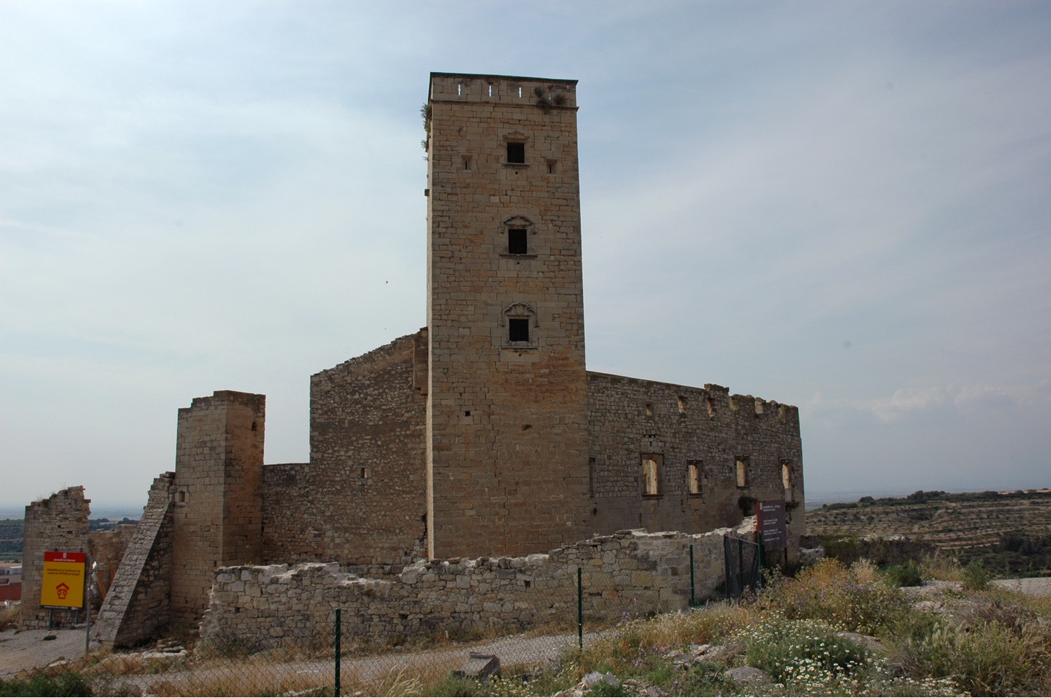 Castell de Ciutadilla, Urgell, Catalonia